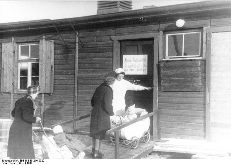 ADN-ZB/Donath Berlin 1946 Heizmaterial ist knapp, doch die Kleinsten benötigen ihre tägliche Körperpflege. Deshalb wurde im Städtischen Krankenhaus Kaulsdorf eine Baby-Badeanstalt eingerichtet.